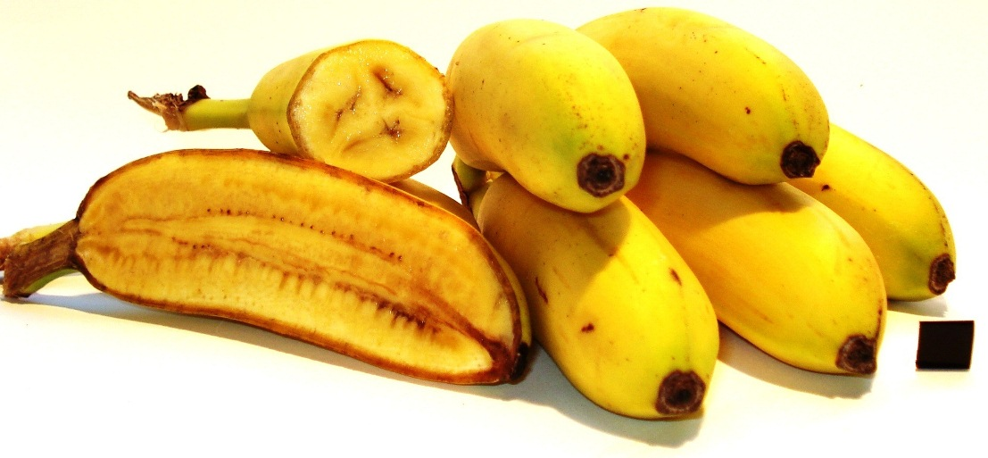 Bananesorte (Musa × paradisiaca) Pisang_Mas